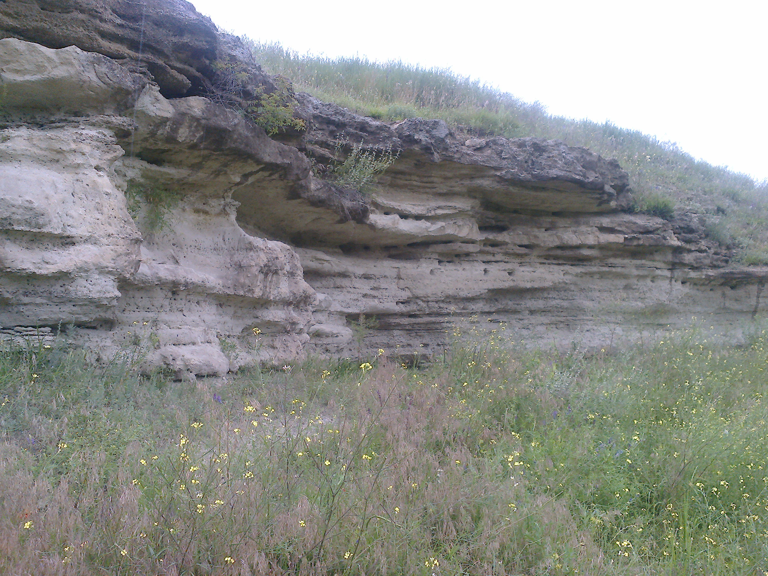 A-042